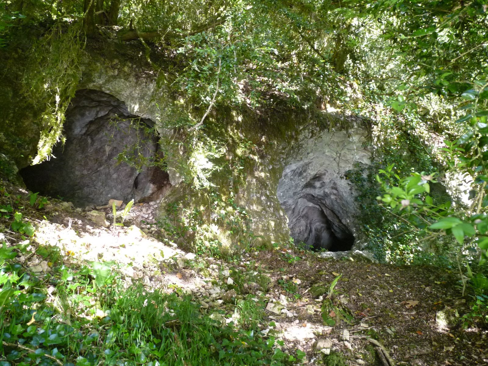 grottes de Rancogne (Charente, France)